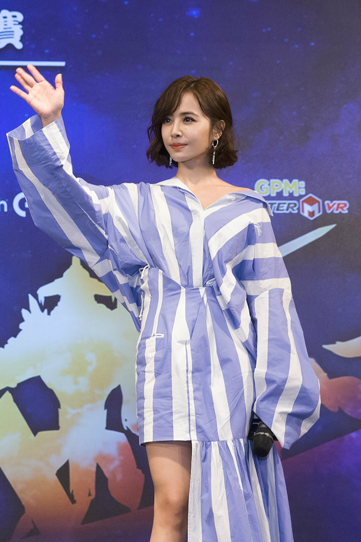 蔡依林Jolin出席王国大帝全球巡回赛现场